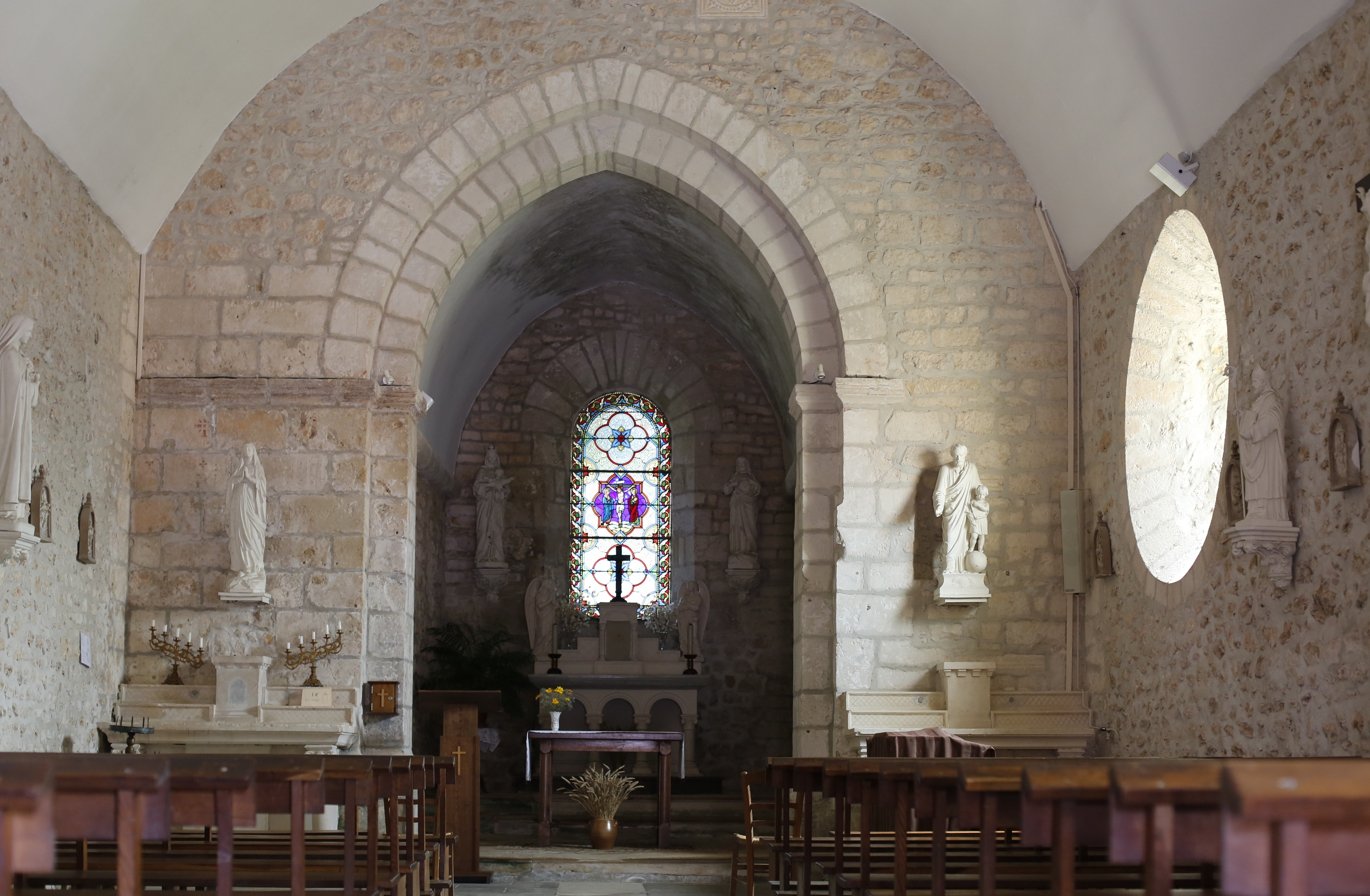 Église Saint-Romain de Mazerolles.